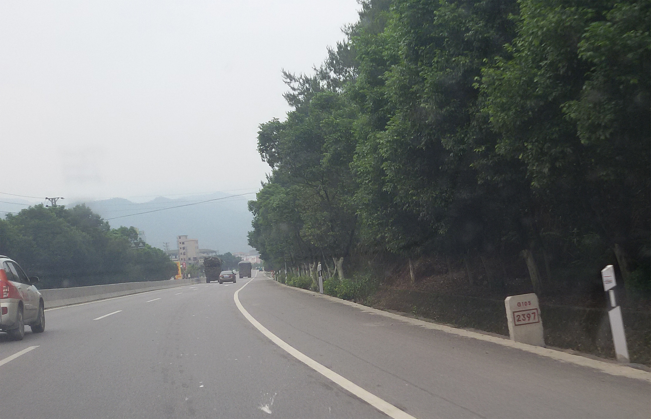 粵語: 105國道——韶關近新豐市區地段